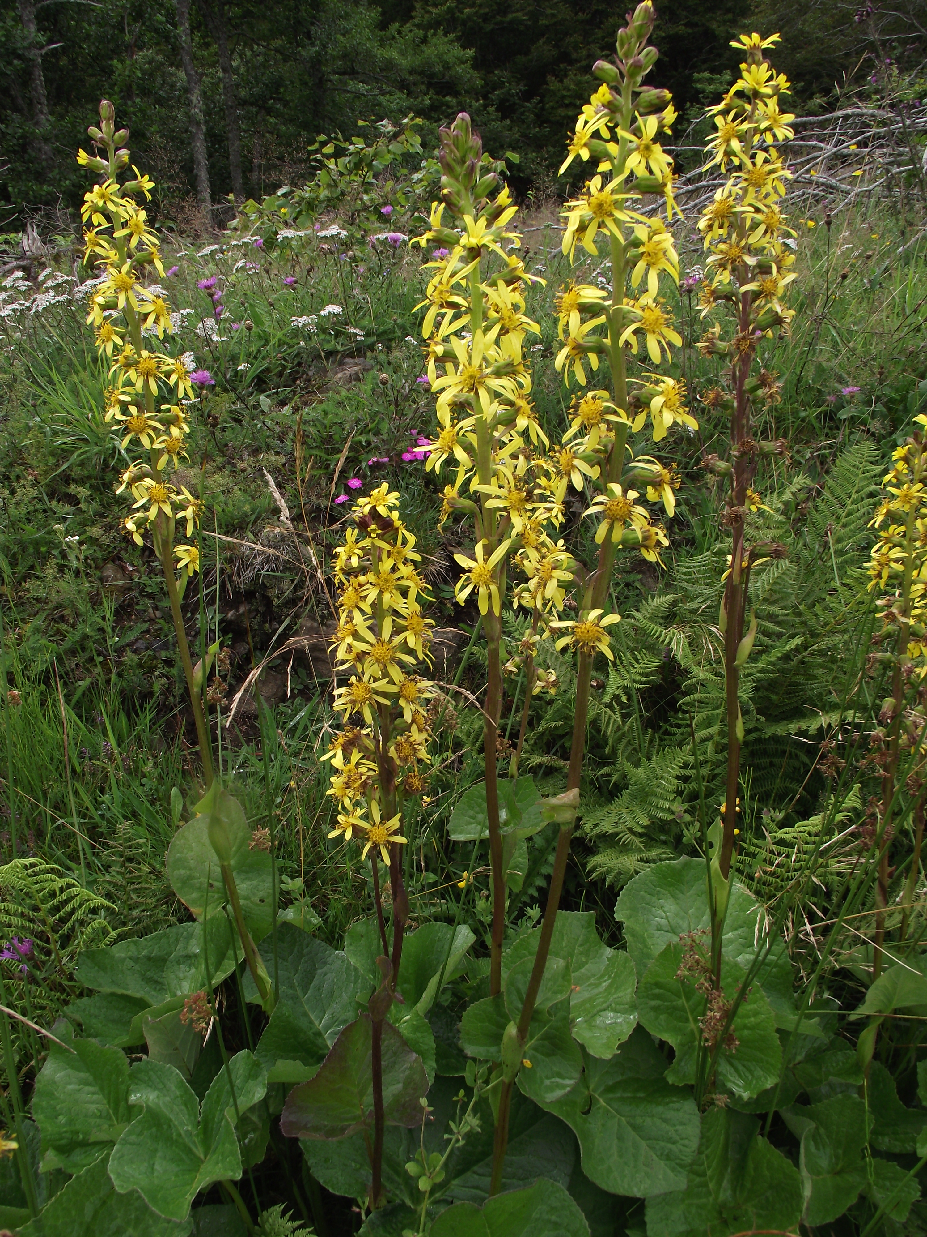 Ligulaire de Sibérie (Ligularia sibirica) dans le bois de Laguiole (Aubrac, Massif central, France).